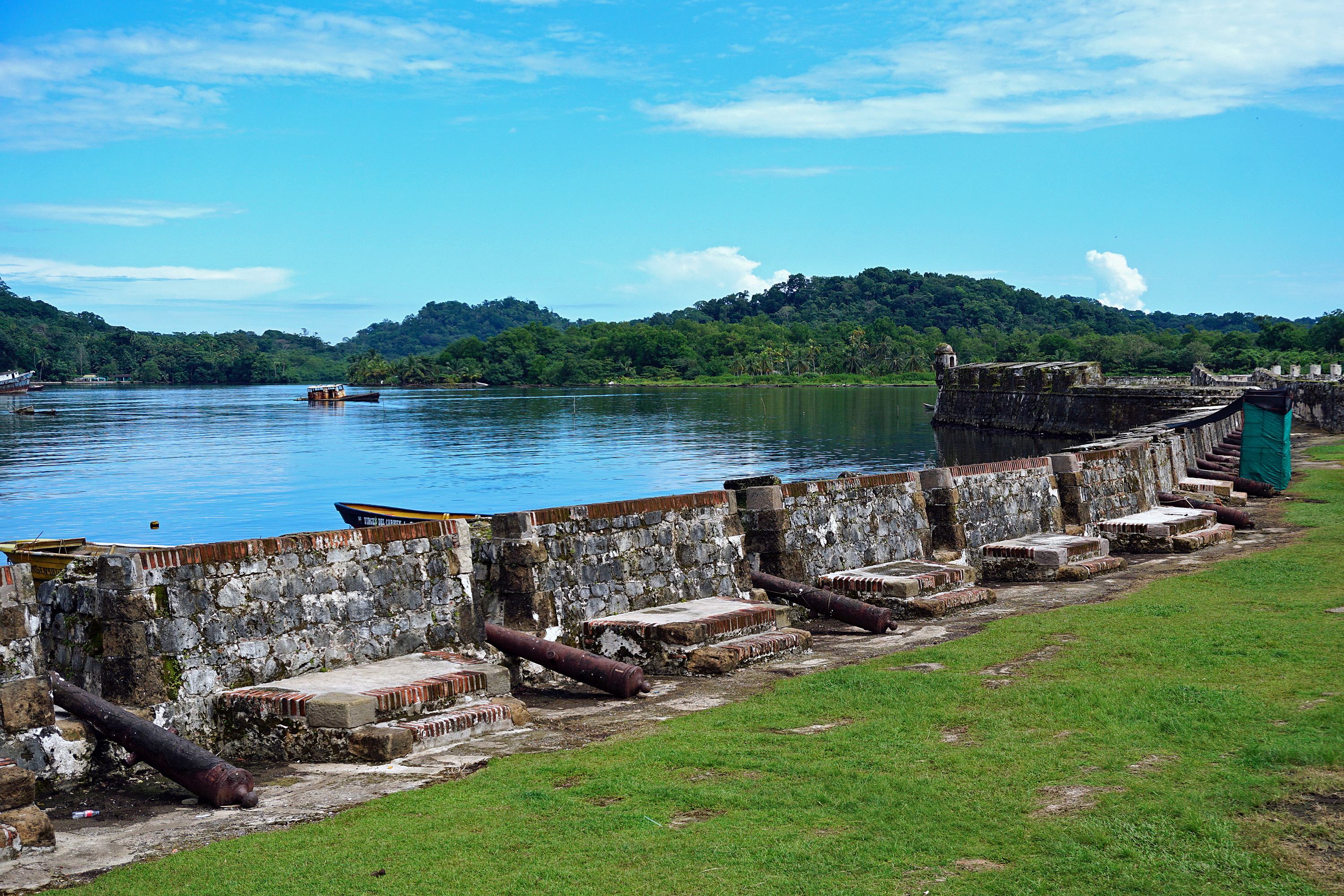 Ruinas del Castillo San Jerónimo, Portobelo, Panamá